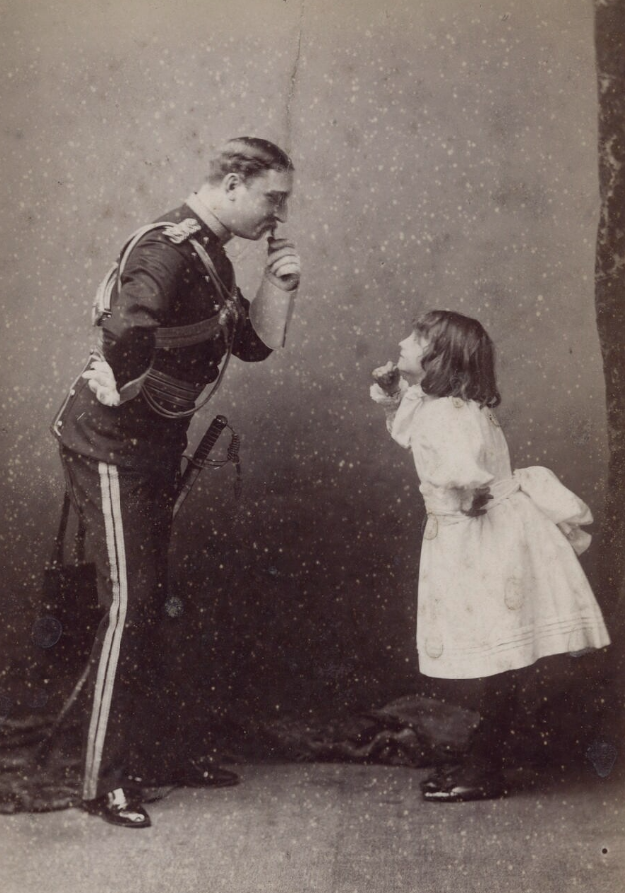 Charles Warlhouse Grimston; Minnie Terry by Elliott & Fry albumen cabinet card, 5 3/4 in. x 4 1/8 in. (147 mm x 105 mm) image size Given by Terence Pepper, 2013 Photographs Collection NPG x138139